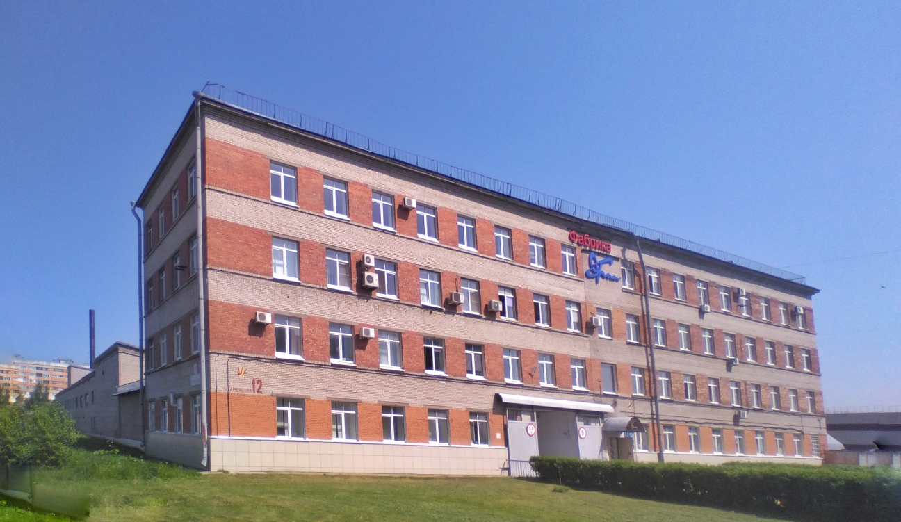 Здание фабрики Грим в наши дни